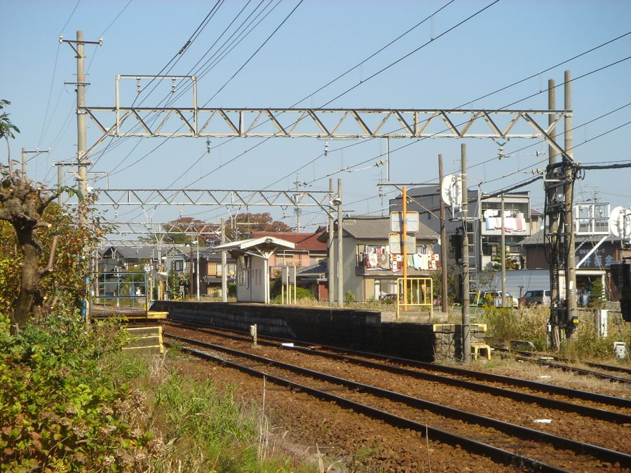 友江駅（岐阜県大垣市・養老鉄道養老線（撮影当時は近鉄）） 撮影：投稿者(Monami)、撮影日：2005年11月